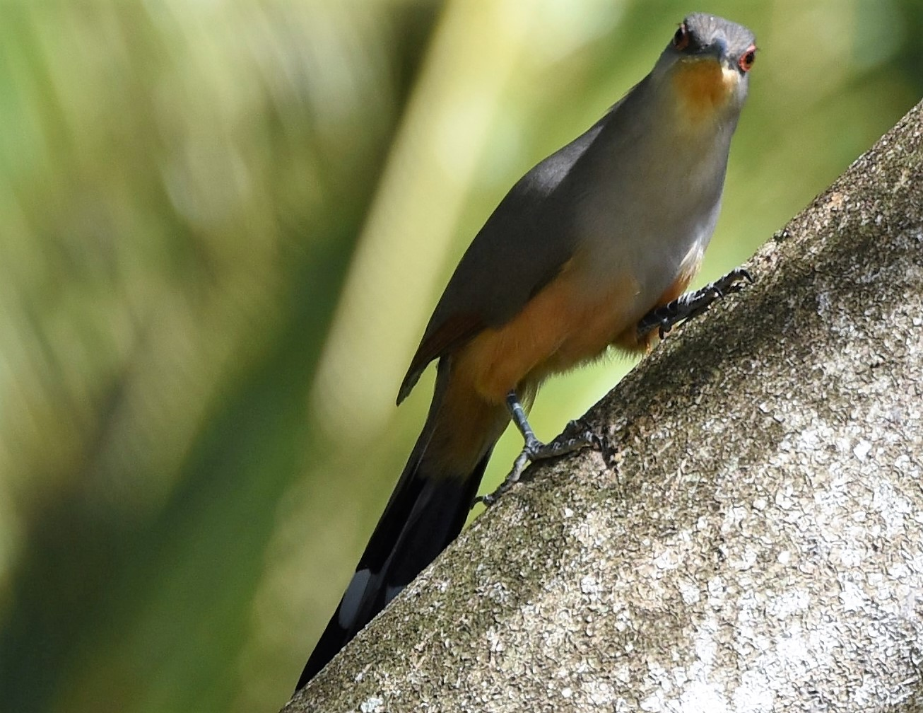 Haitikuckuck Coccyzus longirostris longirostris Aufnahme Punta Cana, Dominikanischen Republik